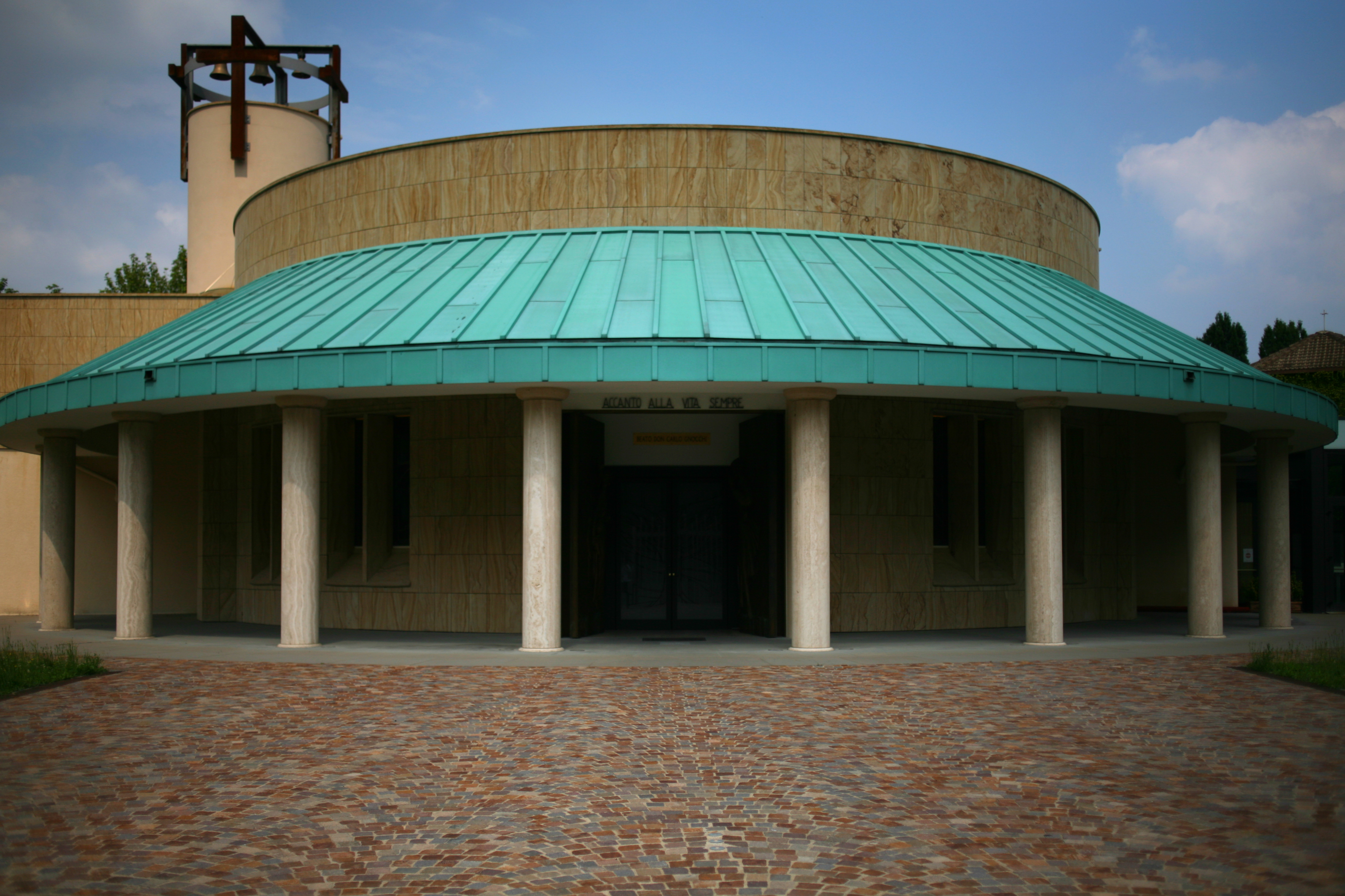 Esterno del Santuario diocesano del beato don Gnocchi